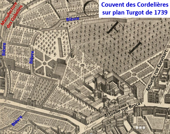 Couvent des cordelières sur carte de 1739